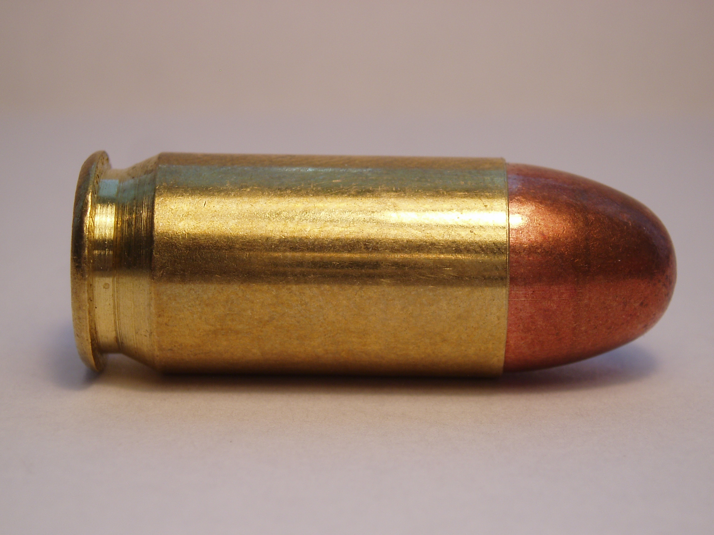 45 ACP pistol cartrdige. FMJ bullet. Manufacturer: Sellier & Bellot.